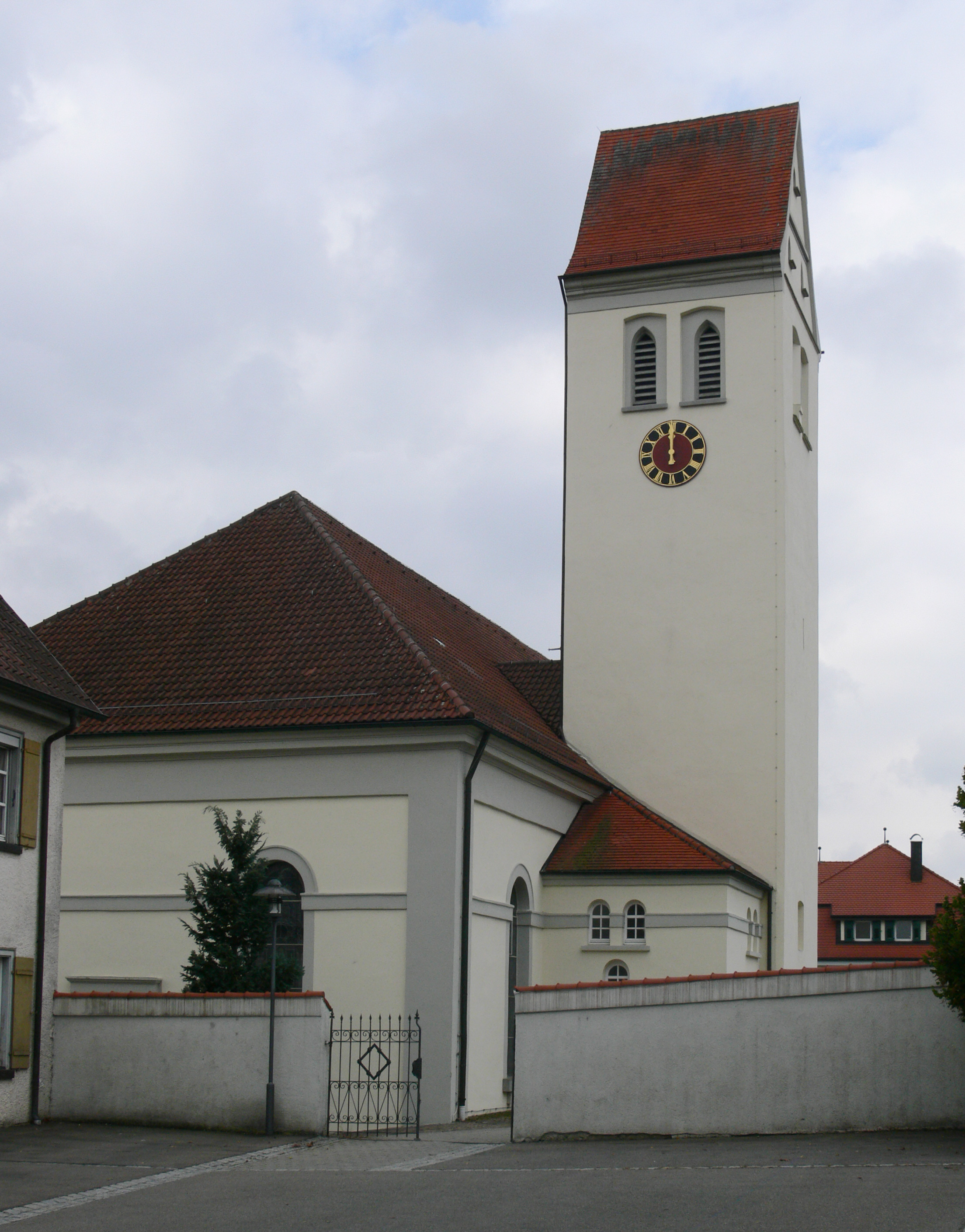 Pfarrkirche St. Urban, Ebenweiler